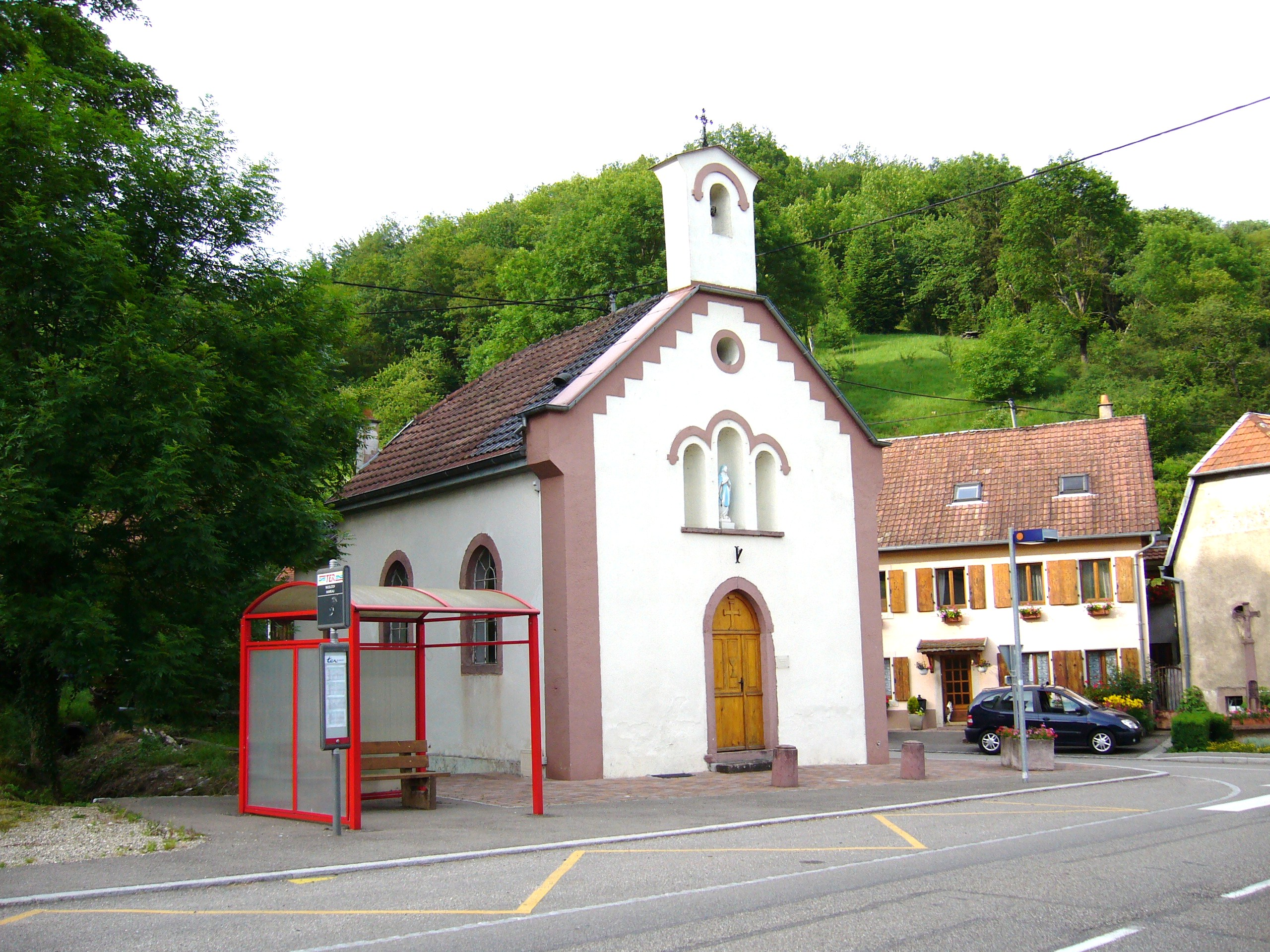 Lièpvre 038.JPG